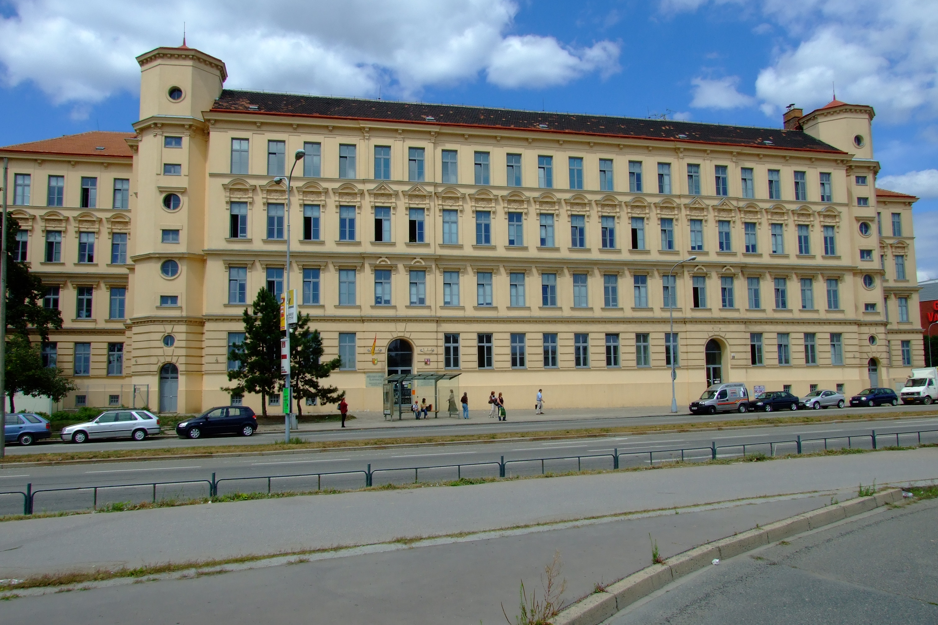 Městský úřad Šlapanice, detašované pracoviště v Brně